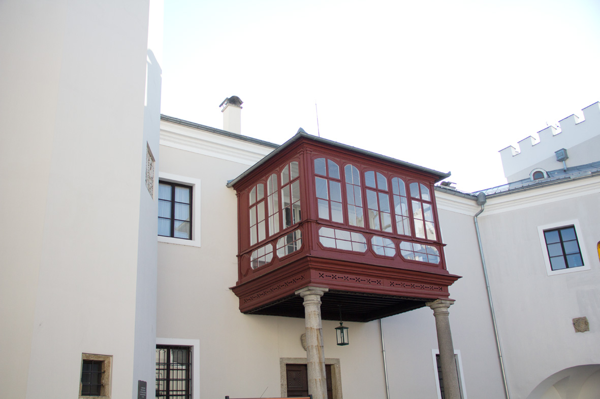 hölzern verglaster Balkon imm Innenhof des Schlosses